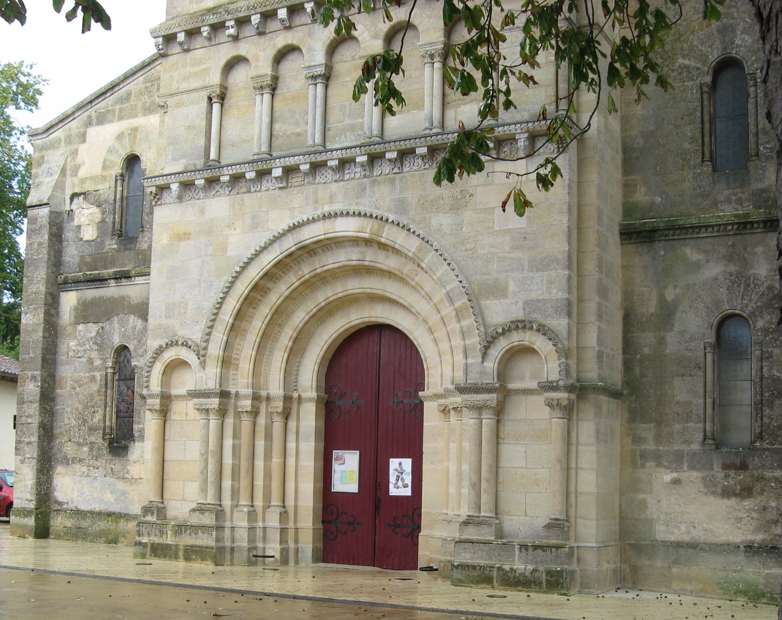 Façade ouest, 19E s. .